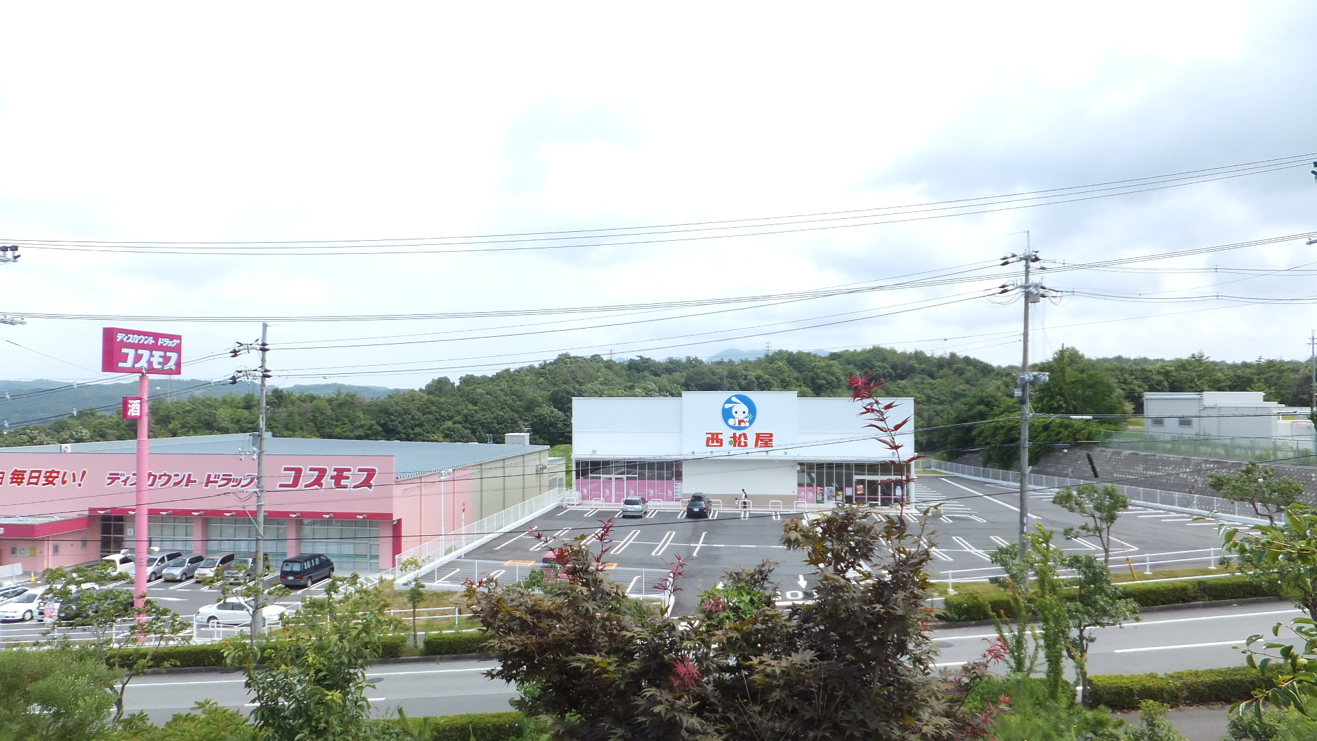 西松屋 三木志染店